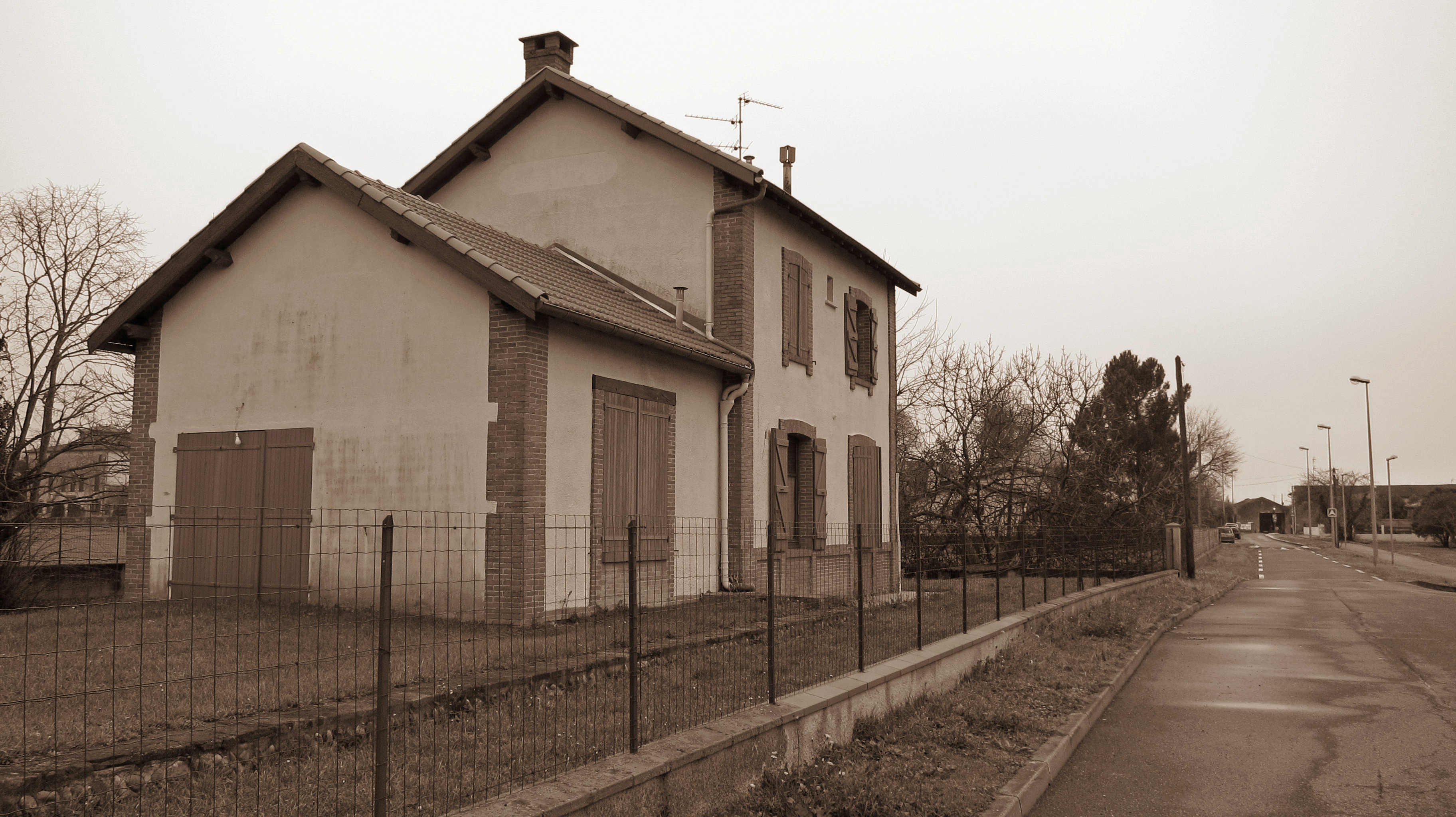 Launaguet (Haute-Garonne, Midi-Pyrénées, France) : L'ancienne gare, rue Fignac.